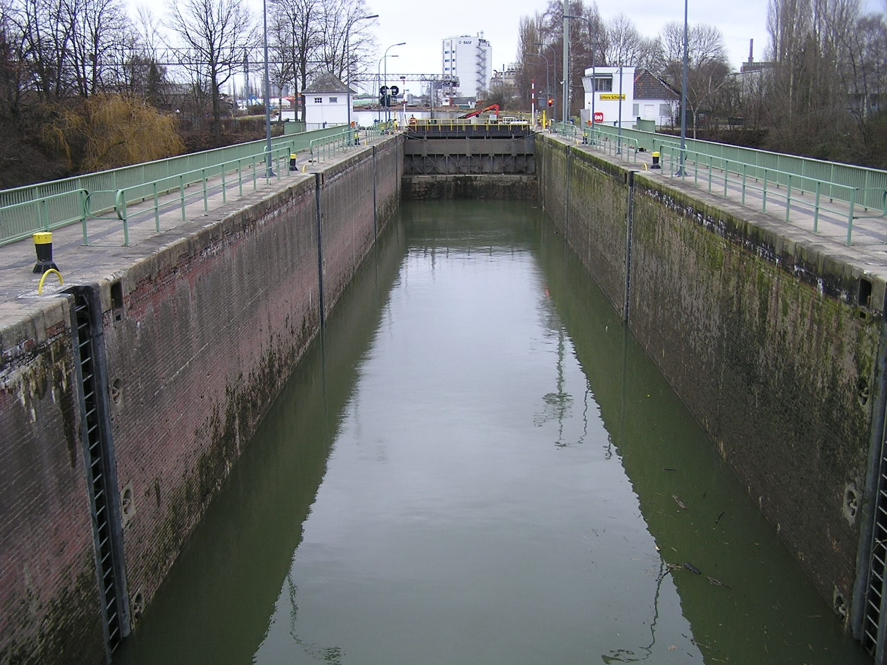 Die Untere Schleuse am Wasserstraßenkreuz Minden in Minden, Nordrhein-Westfalen. Die Schleuse verbindet den Mittellandkanal und die Weser. Blick zeigt in Richtung Bergfahrt zum Industriehafen II am Mittellandkanal. Die Untere Schleuse wurde in den Jahren 1921–1925 gebaut. Sie hat eine nutzbare Kammerlänge von 82 m und eine Kammerbreite von 12,50 m. Der Höhenunterschied zwischen dem Industriehafen II und der Weser beträgt etwa 7 m.